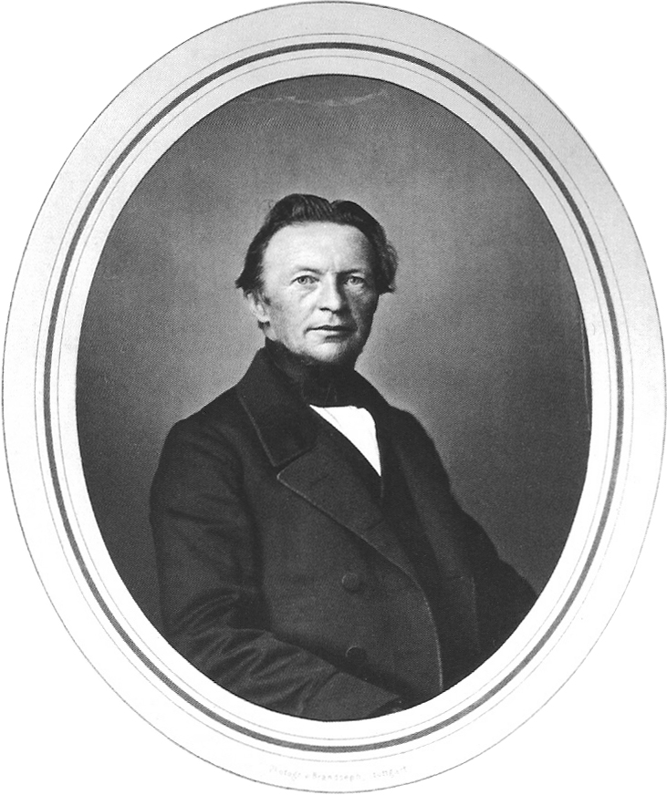 Prof. Eduard Reusch [Professor für Physik an der Universität Tübingen] (Salzpapier koloriert unter Passepartout, Maße: Bild 152 × 118 mm; mit Träger 280 × 236 mm)